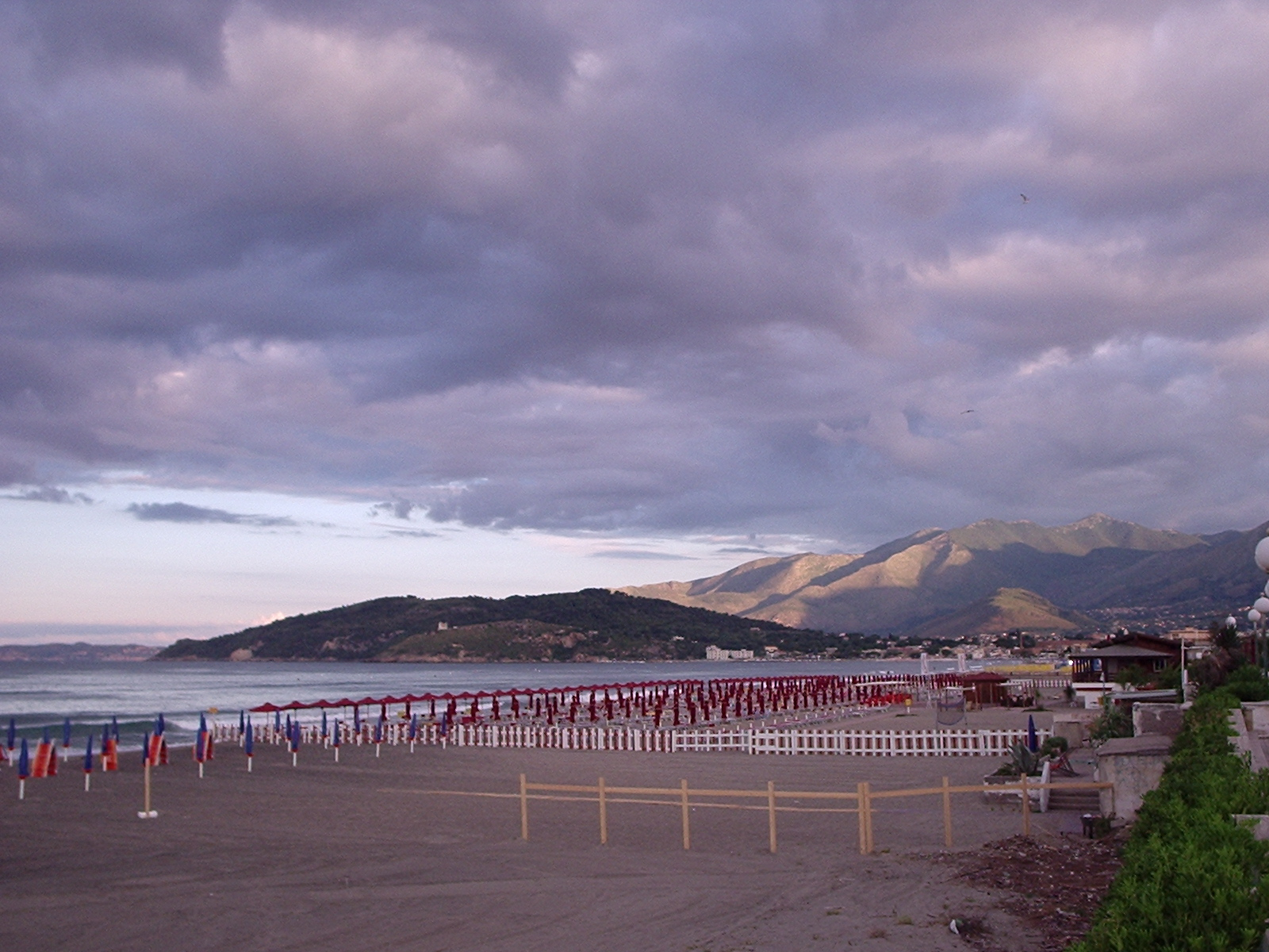 La spiaggia di Scauri dal Lungomare, il Monte d'Oro, i monti Aurunci sullo sfondo